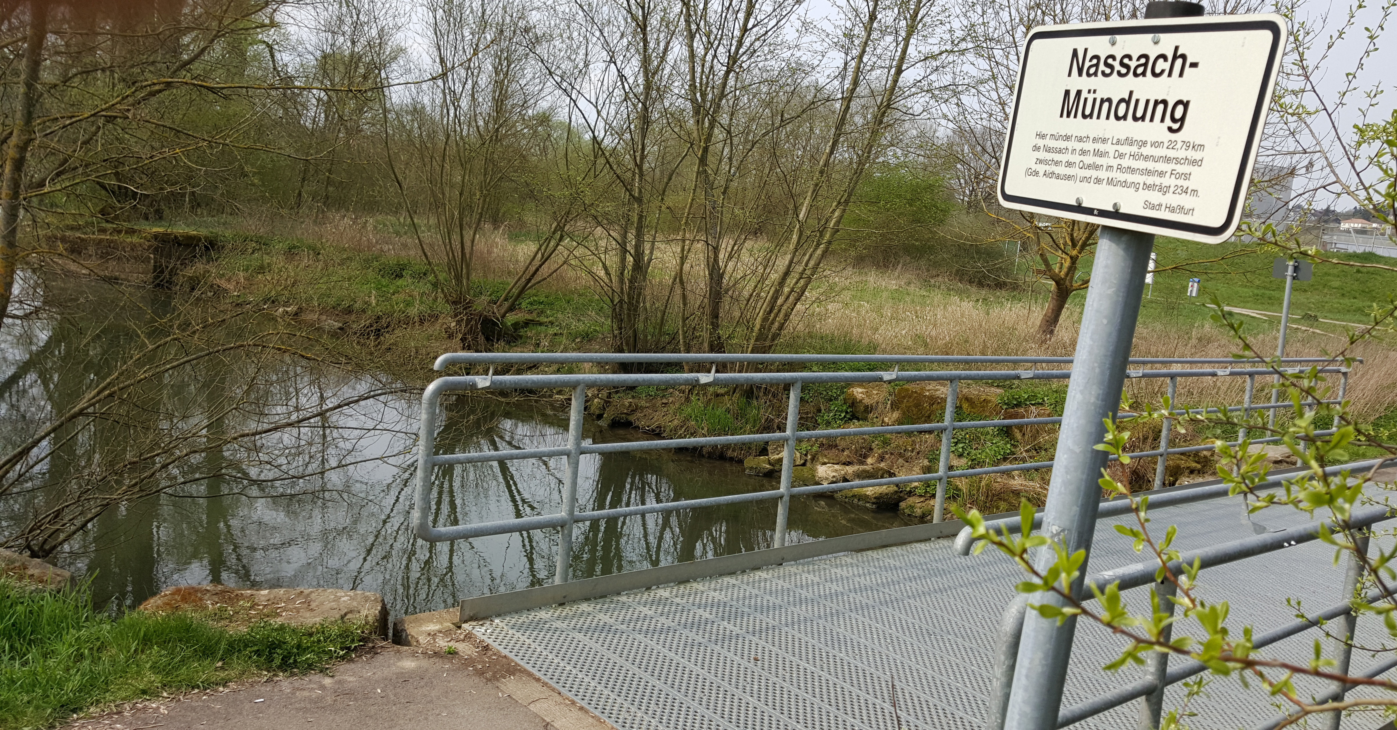 Haßfurt in Unterfranken. Mündung des Flusses Nassach in den Main. Letzte Brücke über die Nassach. Auf dem Foto ist der Main, etwa in 20 m Distanz, mit Mühe zu erkennen. Er verläuft quer zum Bild.